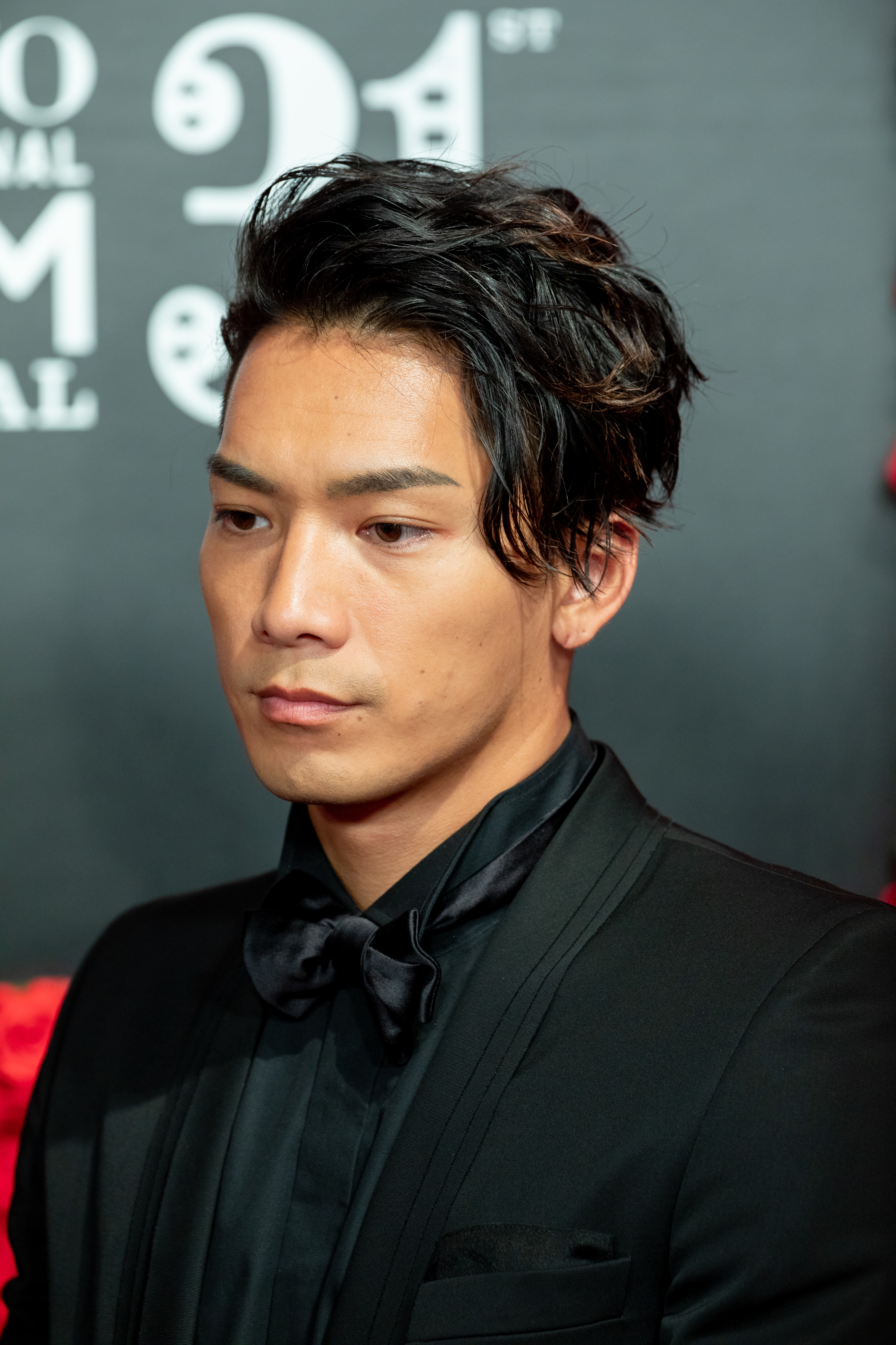 第30回 東京国際映画祭 オープニングセレモニー 野替愁平 (jam)